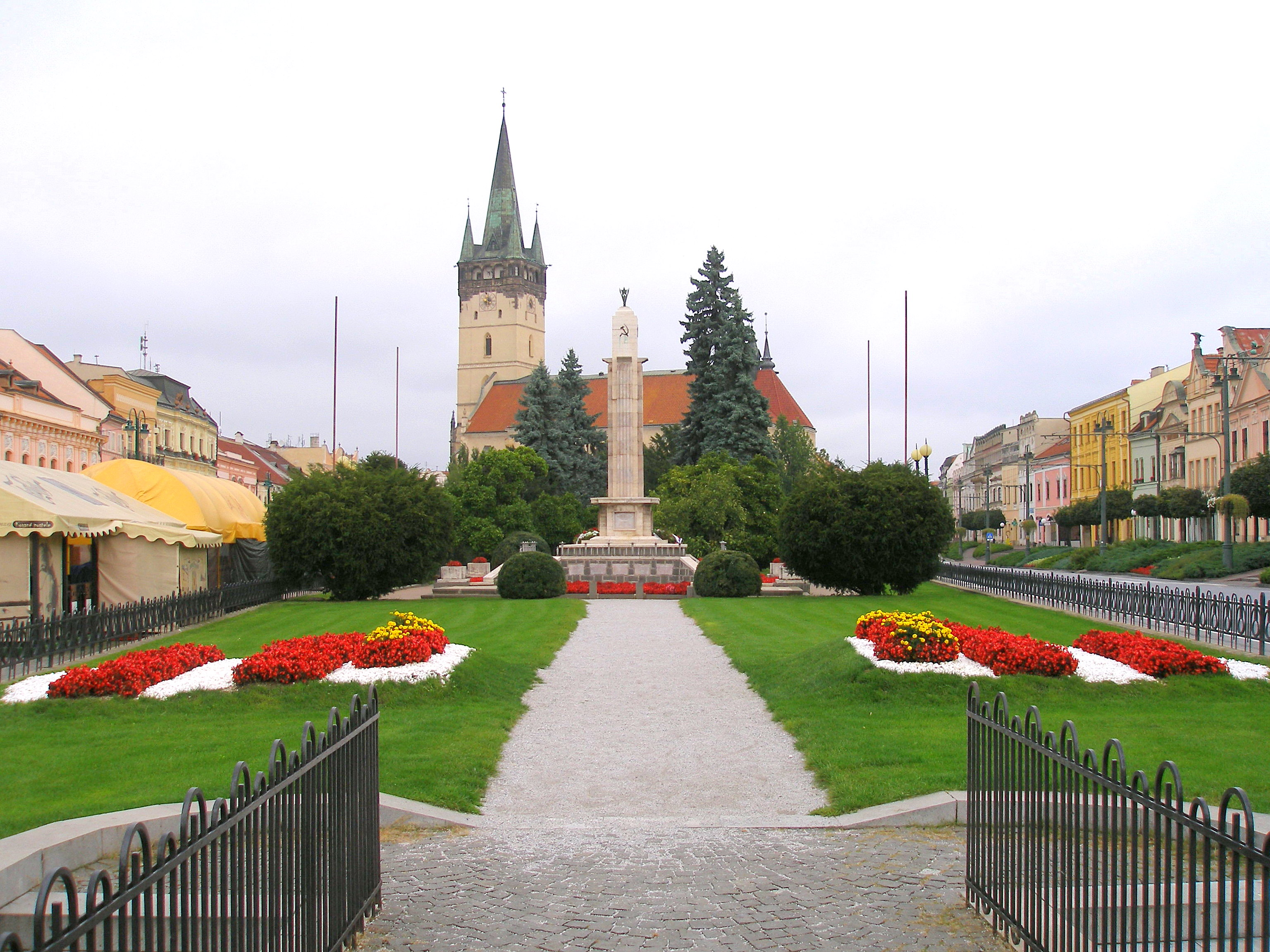 Hlavná ulica Prešov.